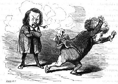 Ferdinand Flocon effrayant Armand Marrast en 1848, caricature de Cham.